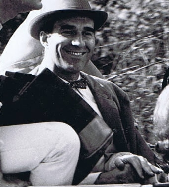 Jean-Jacques Lagarde avec Michel Piccoli, Danielle Darrieux et Emmanuelle Riva dans Le Coup de Grâce de Jean Cayrol (1965).